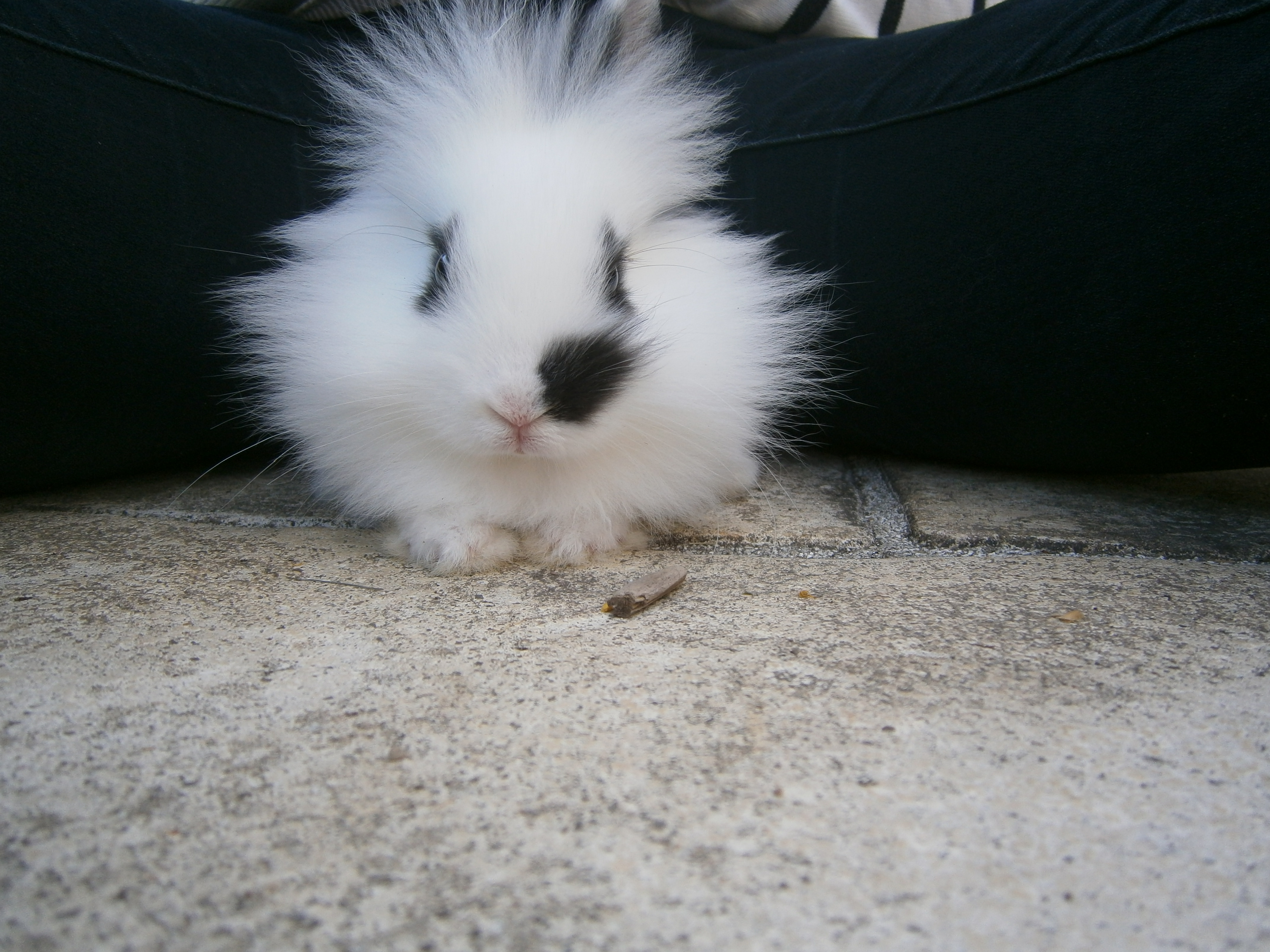 bébé lapin tête de lion